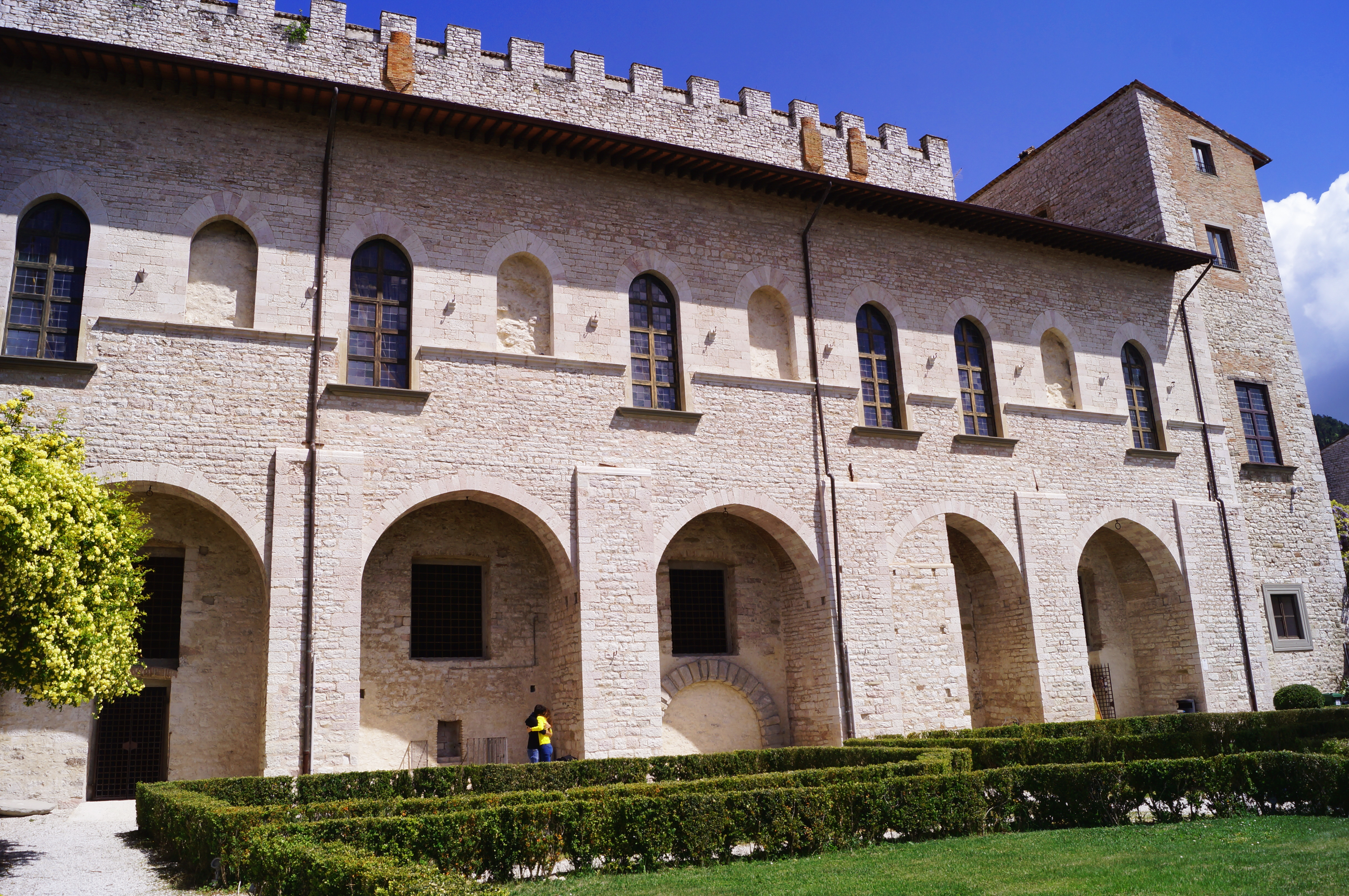 palazzo ducale This is a photo of a monument which is part of cultural heritage of Italy.